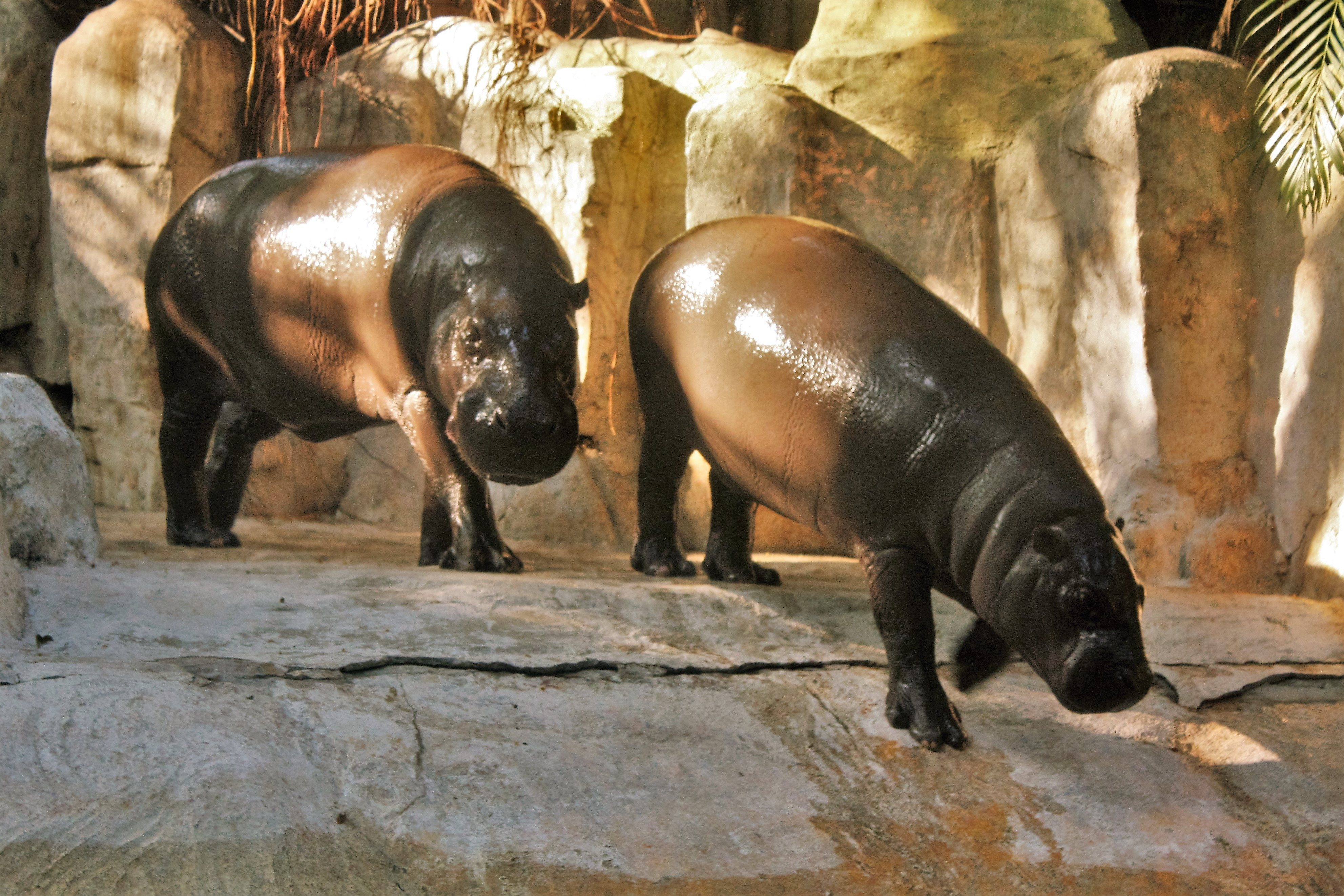 Zoo Guangzhou